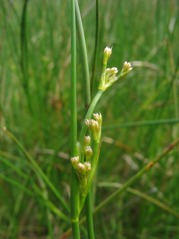 Stumpfblütige Binse Juncus subnodulosus, Warnow-Wiesen bei Rostock